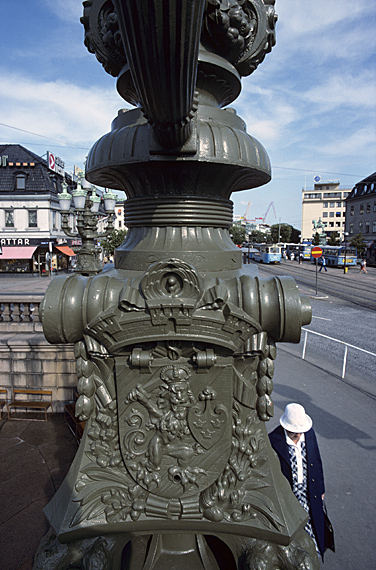 Detaljbild av Göteborgs stadsvapen på broräckets lykthållare. Motiv: Kungsportsbron Nyckelord: Riksintressen Kategori: Stadsmiljö, Bro Detaljbild av Göteborgs stadsvapen på broräckets lykthållare.